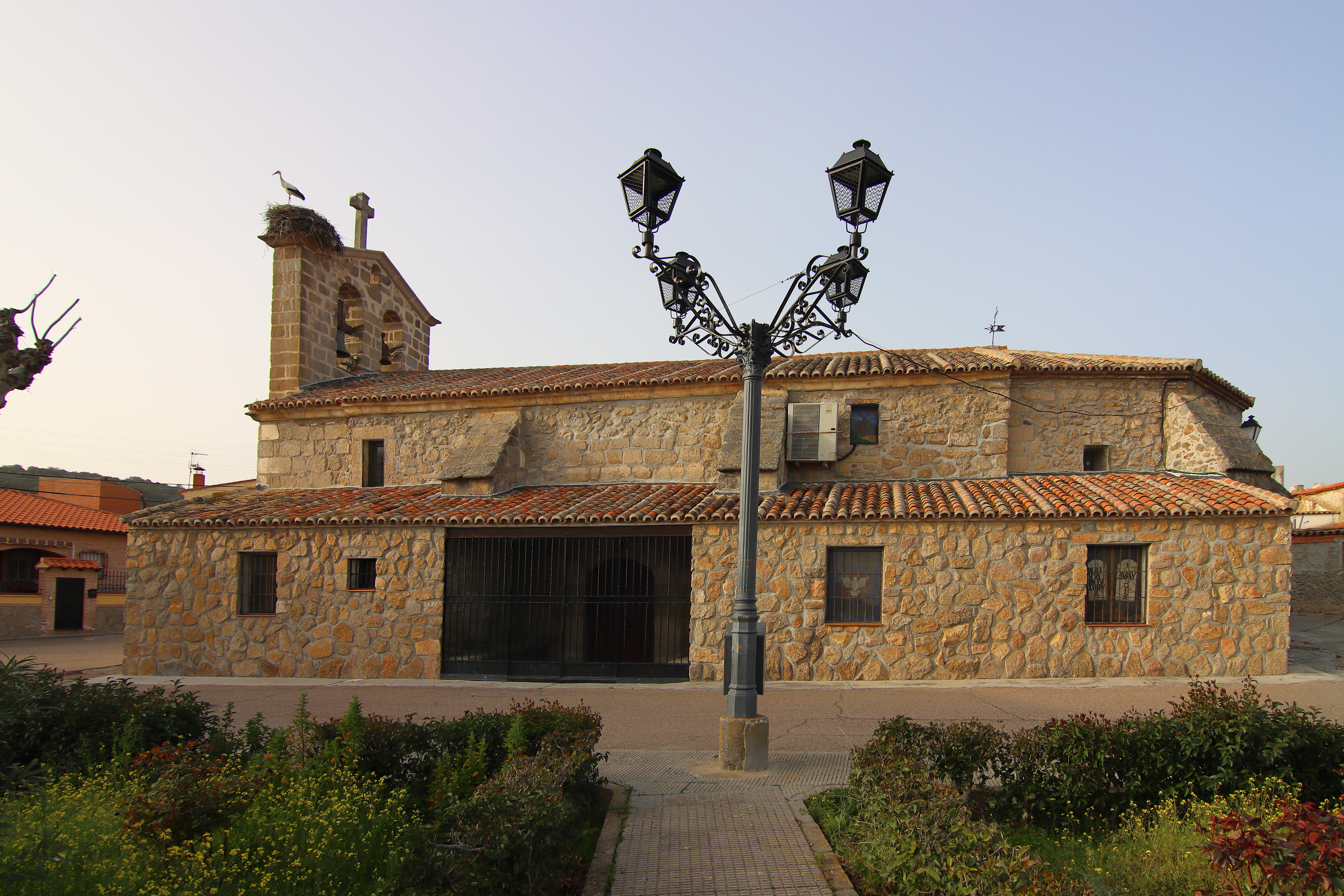 Iglesia de Nuestra Señora de la Asunción, Nuño Gómez, 03